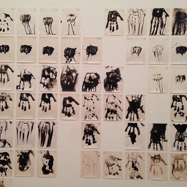 Hand by Gunnar Smoliansky at Moderna Museet #2014sdw